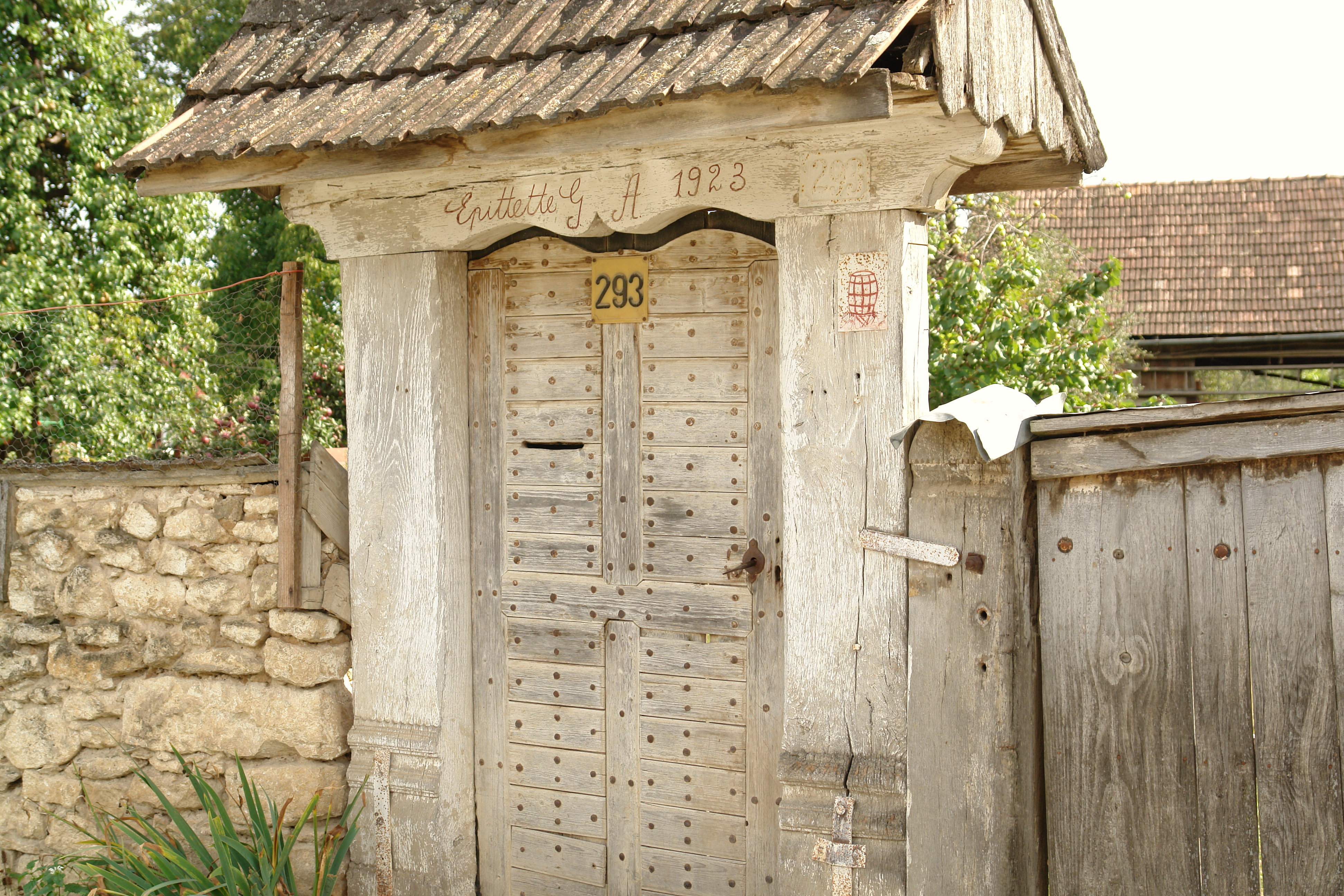 Aranyosszéki székelykapu Kövenden (Plăiești, Cluj).